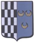 Wapen Sint-Michiels